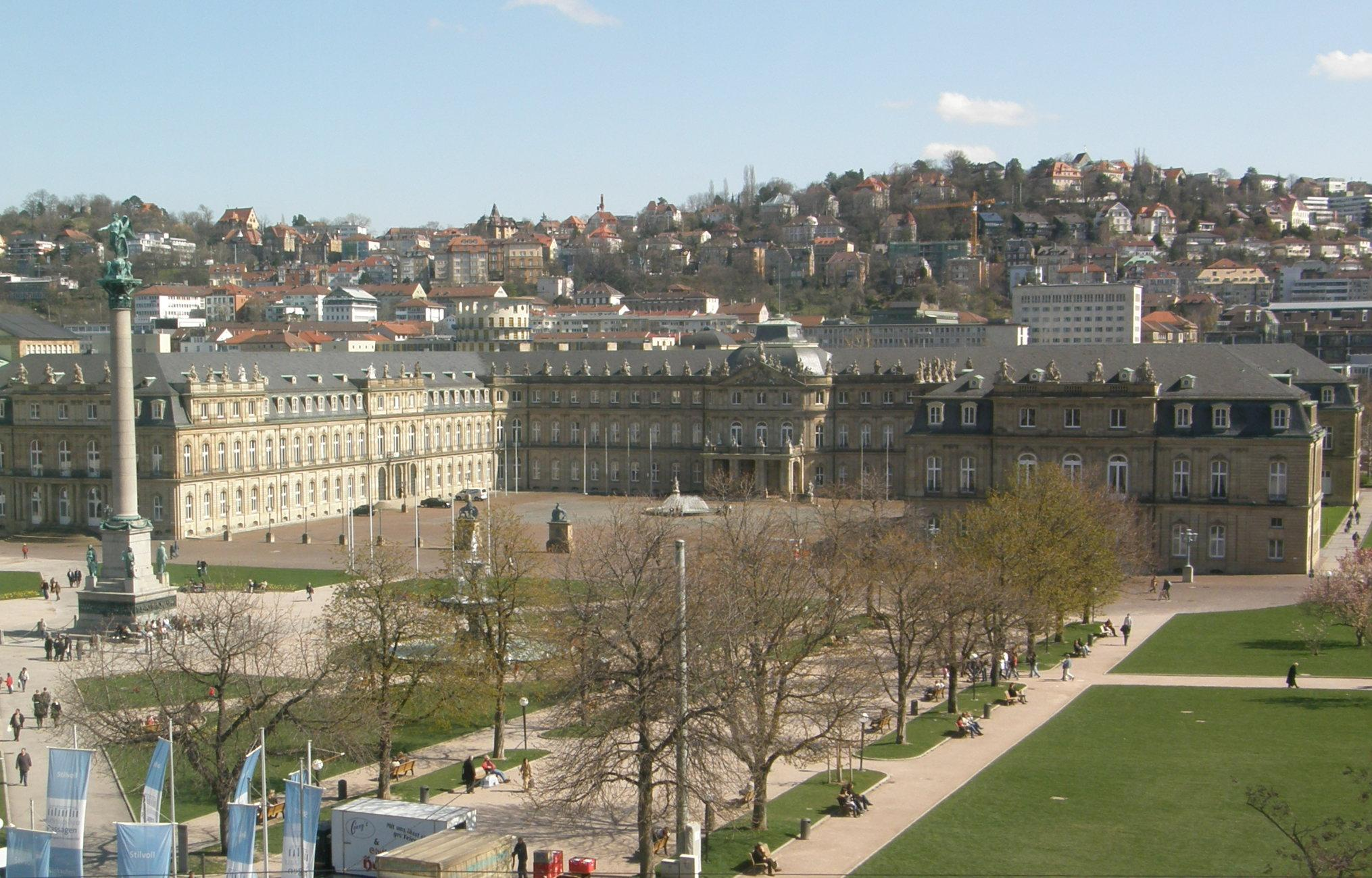 Castillo Nuevo, Stuttgart